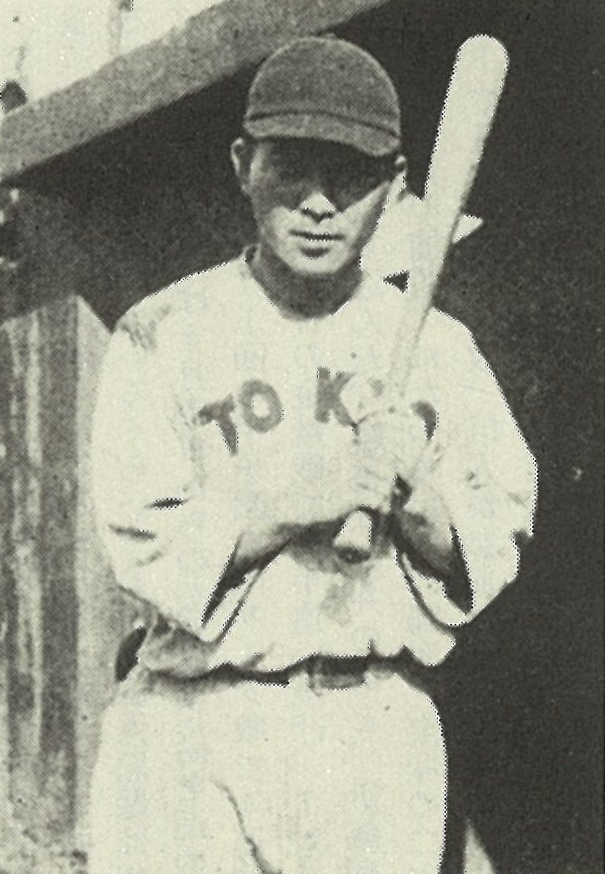 永井武雄（東京倶楽部時代）